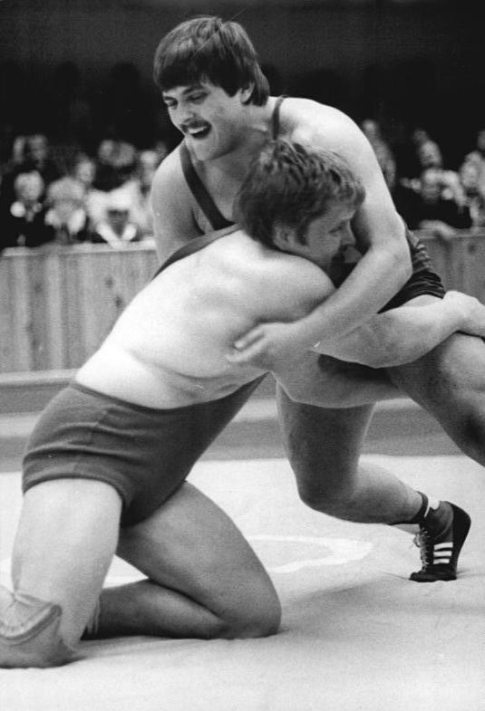 Roland Gehrke, Gerd Smolawa ADN-ZB Lehmann 13.6.82-pe Halle: DDR-Meisterschaften im Freistilringen Vorzeitig durch Schultersieg holte sich der DDR-Serien und Weltmeister in der 100-kg-Gewichtsklasse Roland Gehrke vom Dynamo Luckenwalde (knieend beim Wurfansatz) den Meistertitel. Im Finale stand ihm Gerd Smolawa vom SC Leipzig gegenüber.